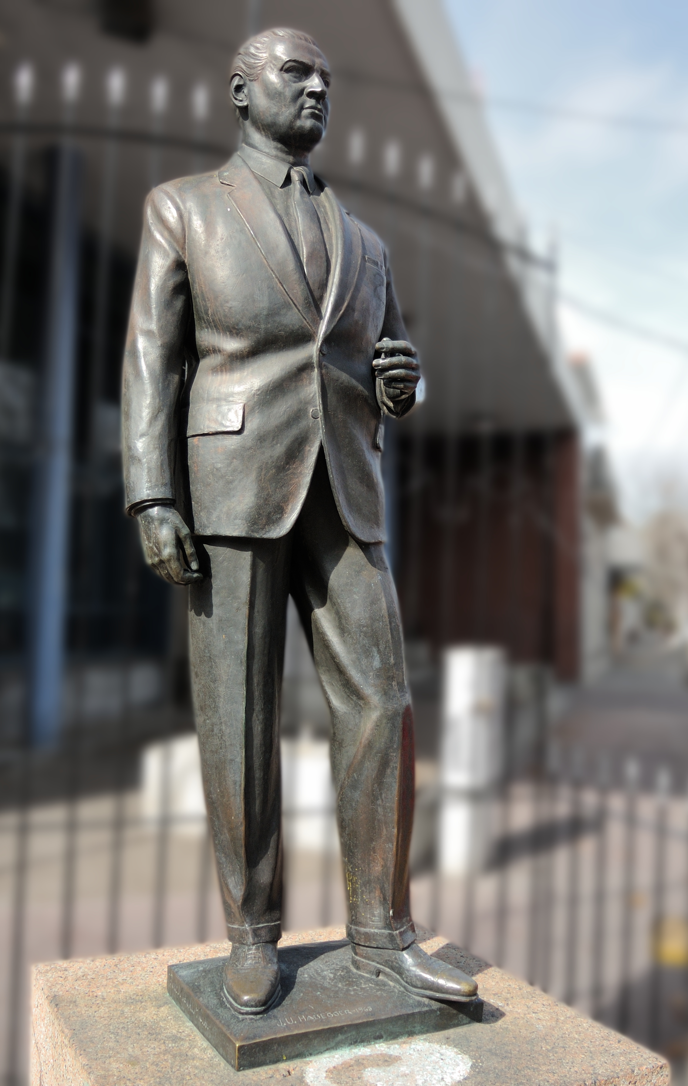 Julio María Sosa Venturini, cantante de tango nacido en Uruguay.